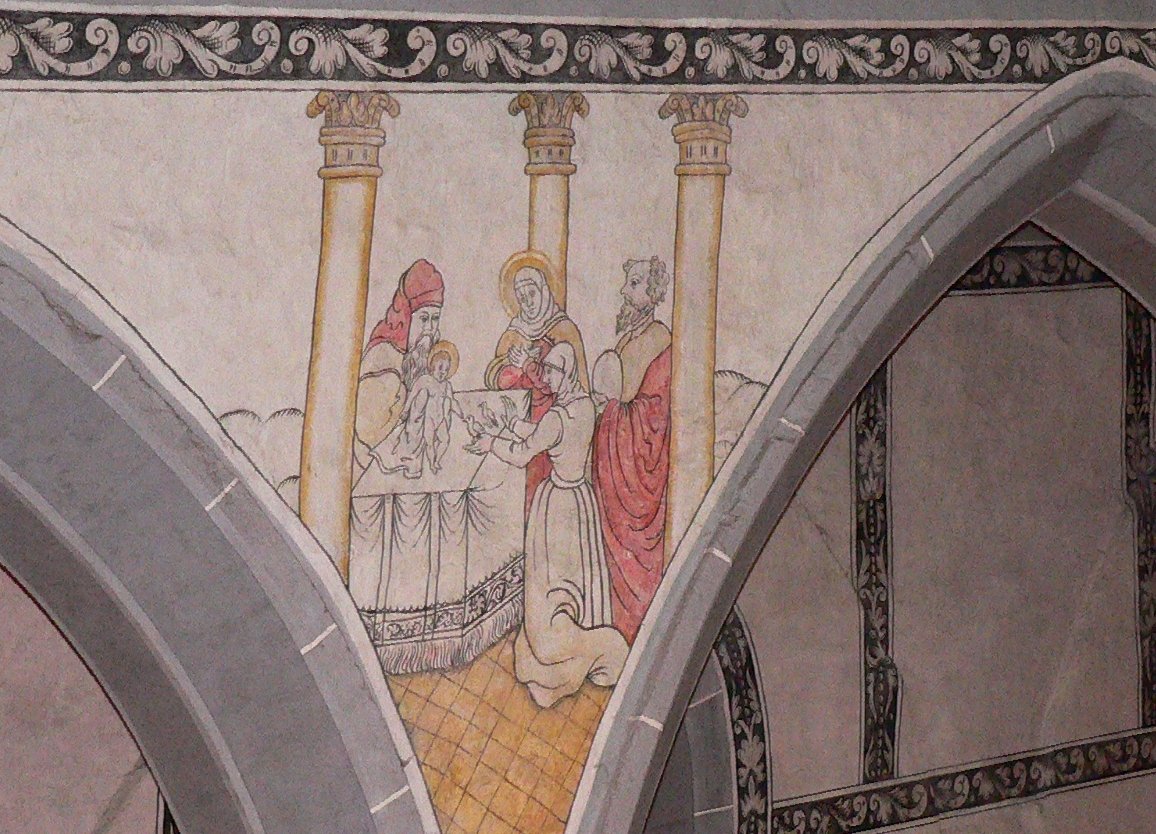 Evangelische Kirche St. Laurentius in Dassel, Niedersachsen, Deutschland - Protestantische Renaissancemalerei (Secco): "Im Tempel" von 1577